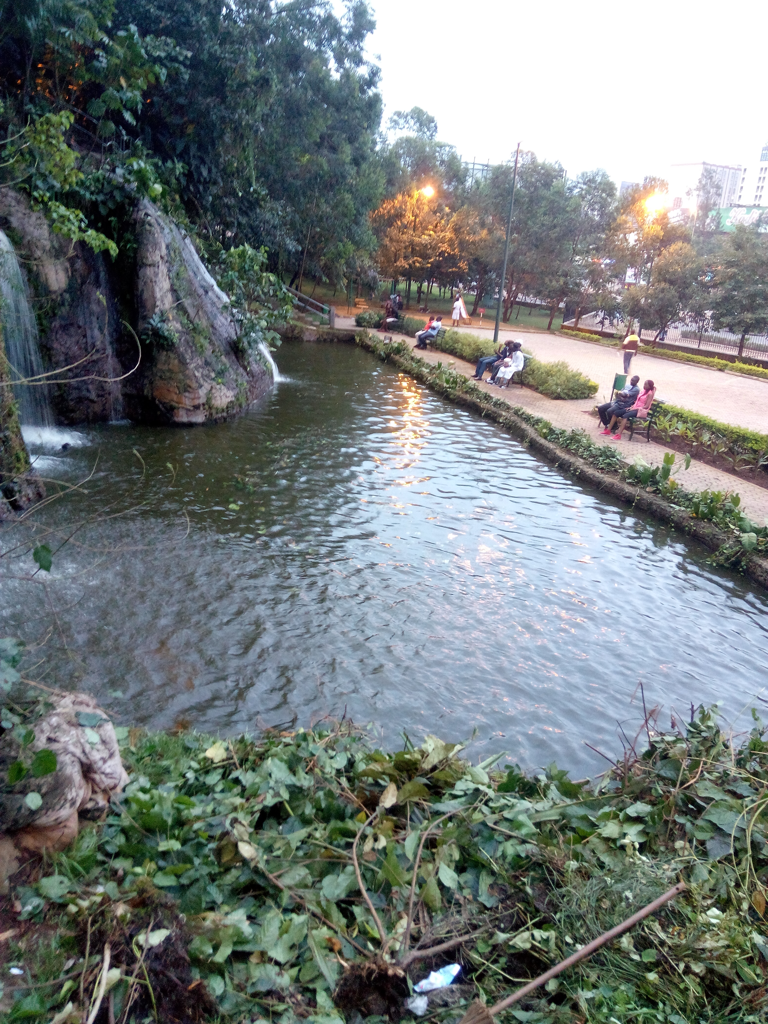 Un grand restaurant et en même temps un lieu d'attraction et de divertissement situé en plein Boulevard du 20 mai à Yaoundé.